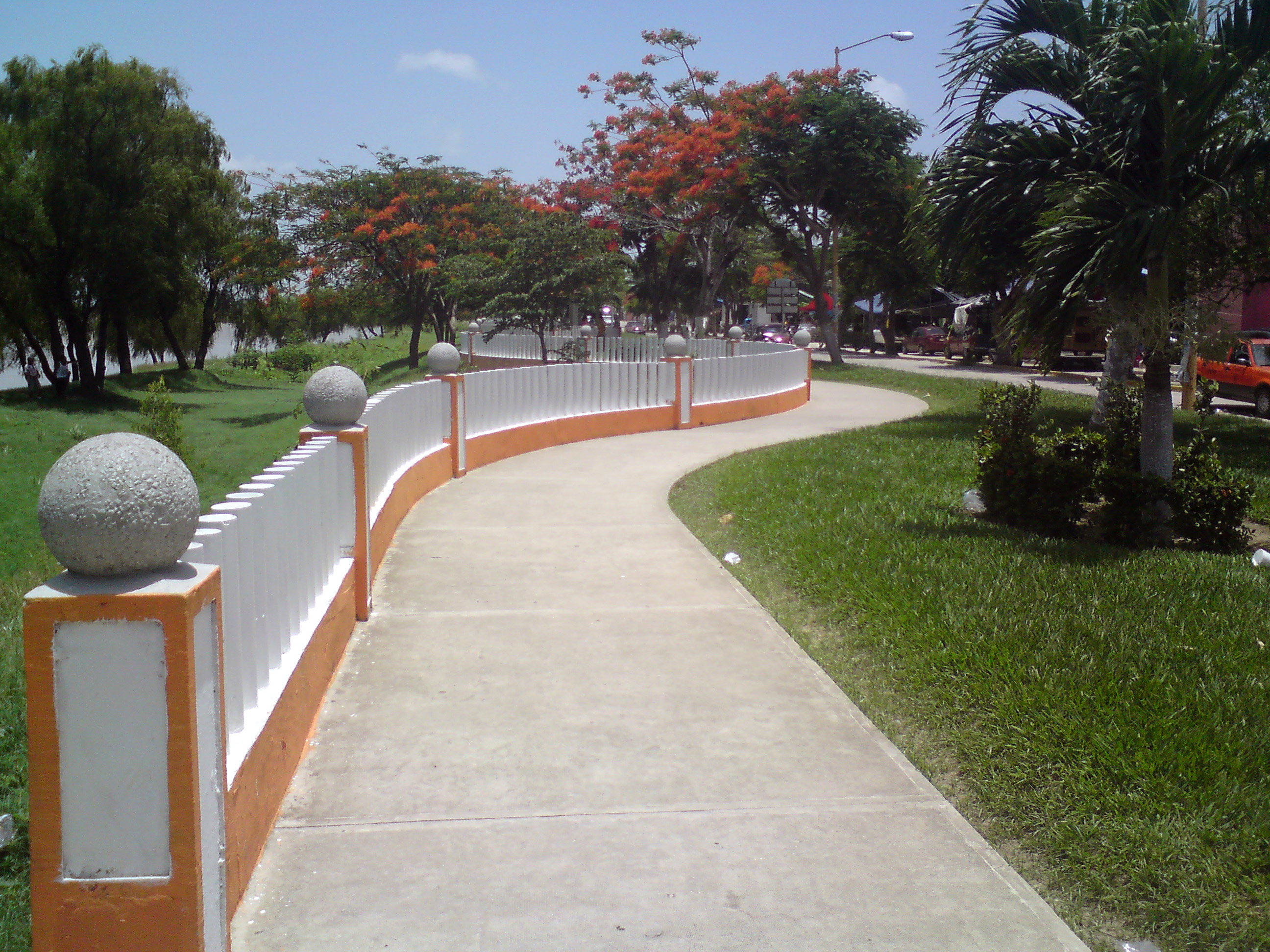 Malecón antiguo de la ciudad de Jonuta, actualmente es un bordo de contención